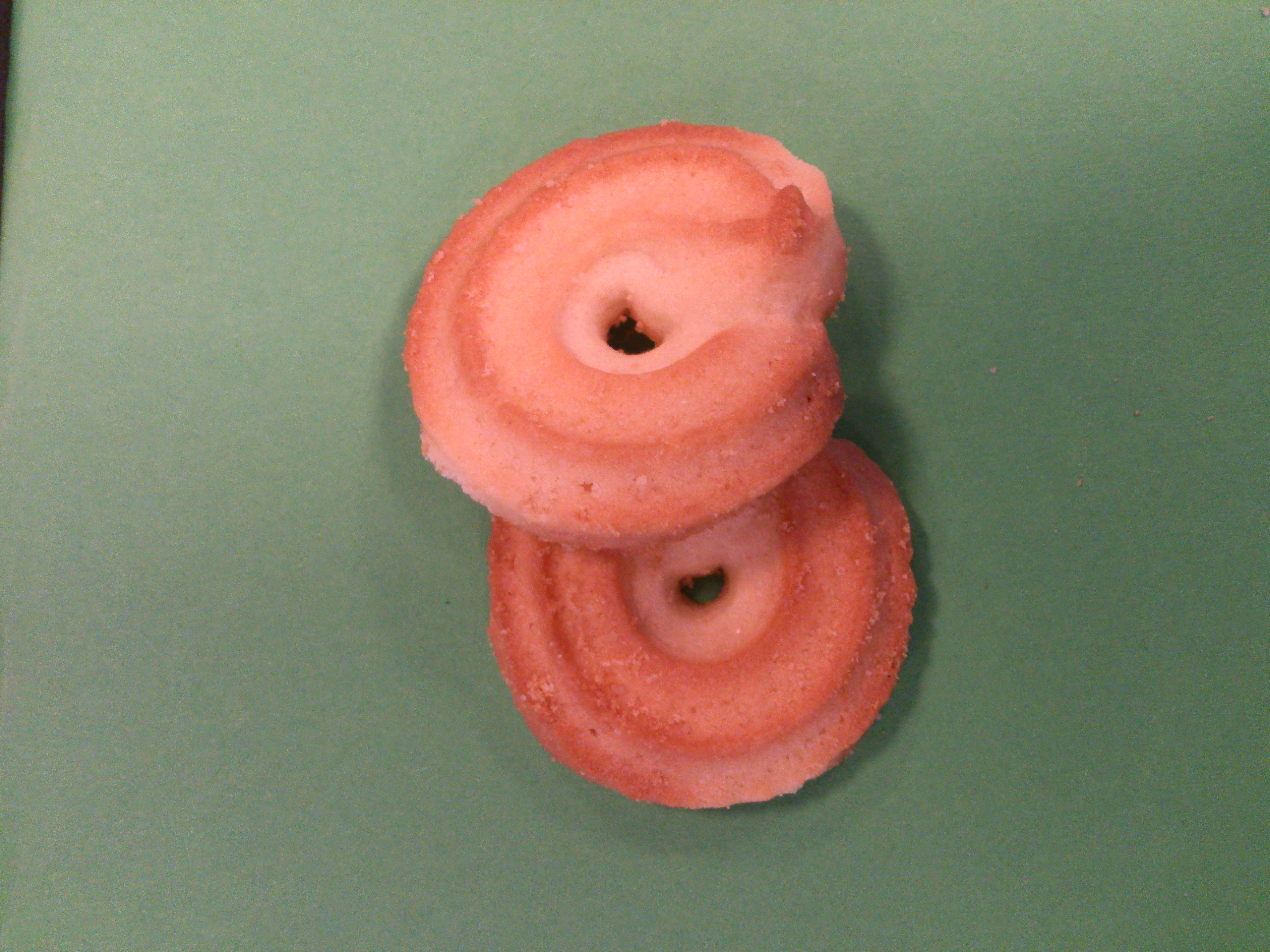 Billede af to vaniljekranse med en baggrund af grønt papir